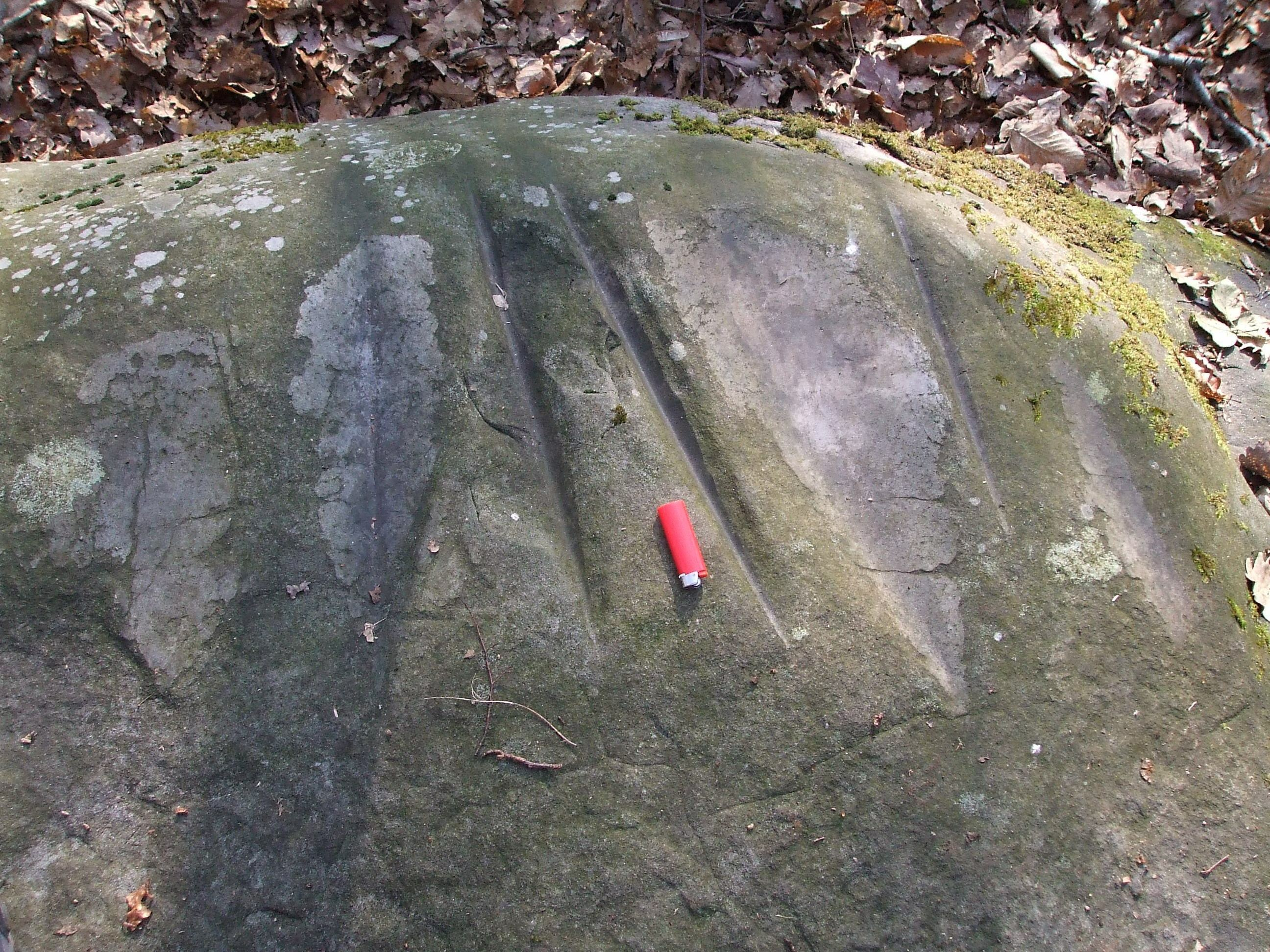 Partie d'un polissoir néolithique situé près du hameau de Villechasson sur la commune de Chevry-en-sereine.